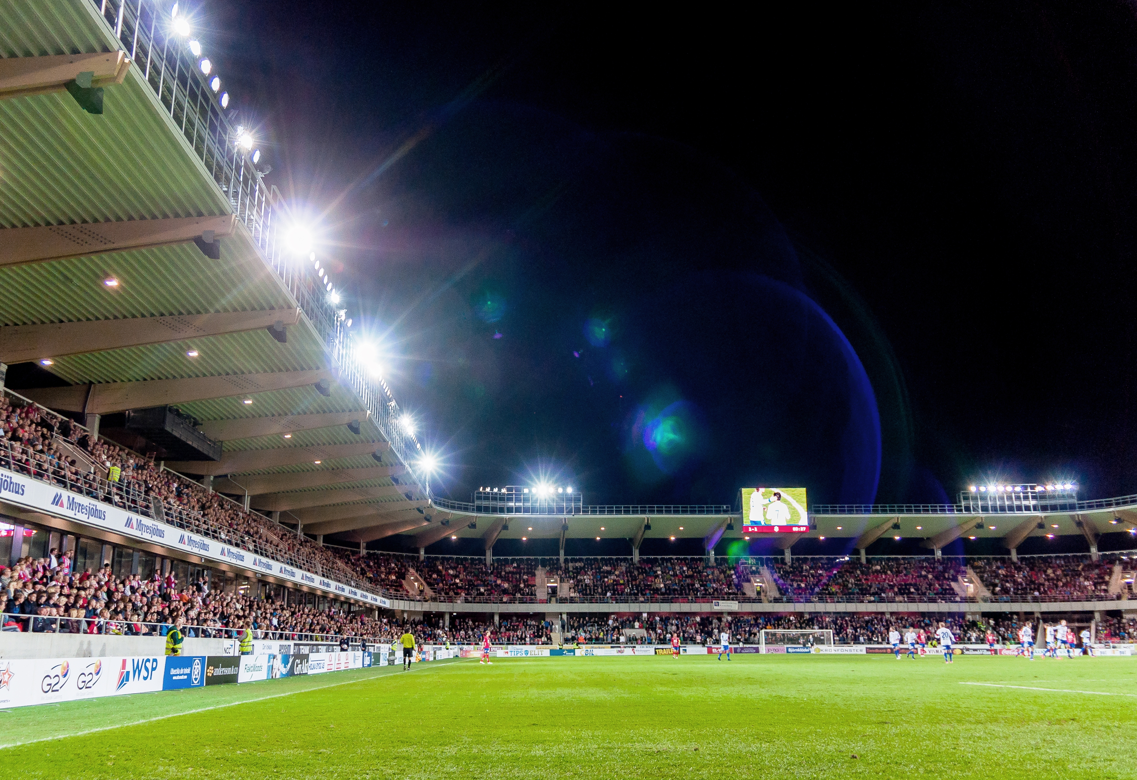 Fullsatta läktare på Östers nya Myresjöhus Arena i premiärmatchen mot Värnamo.